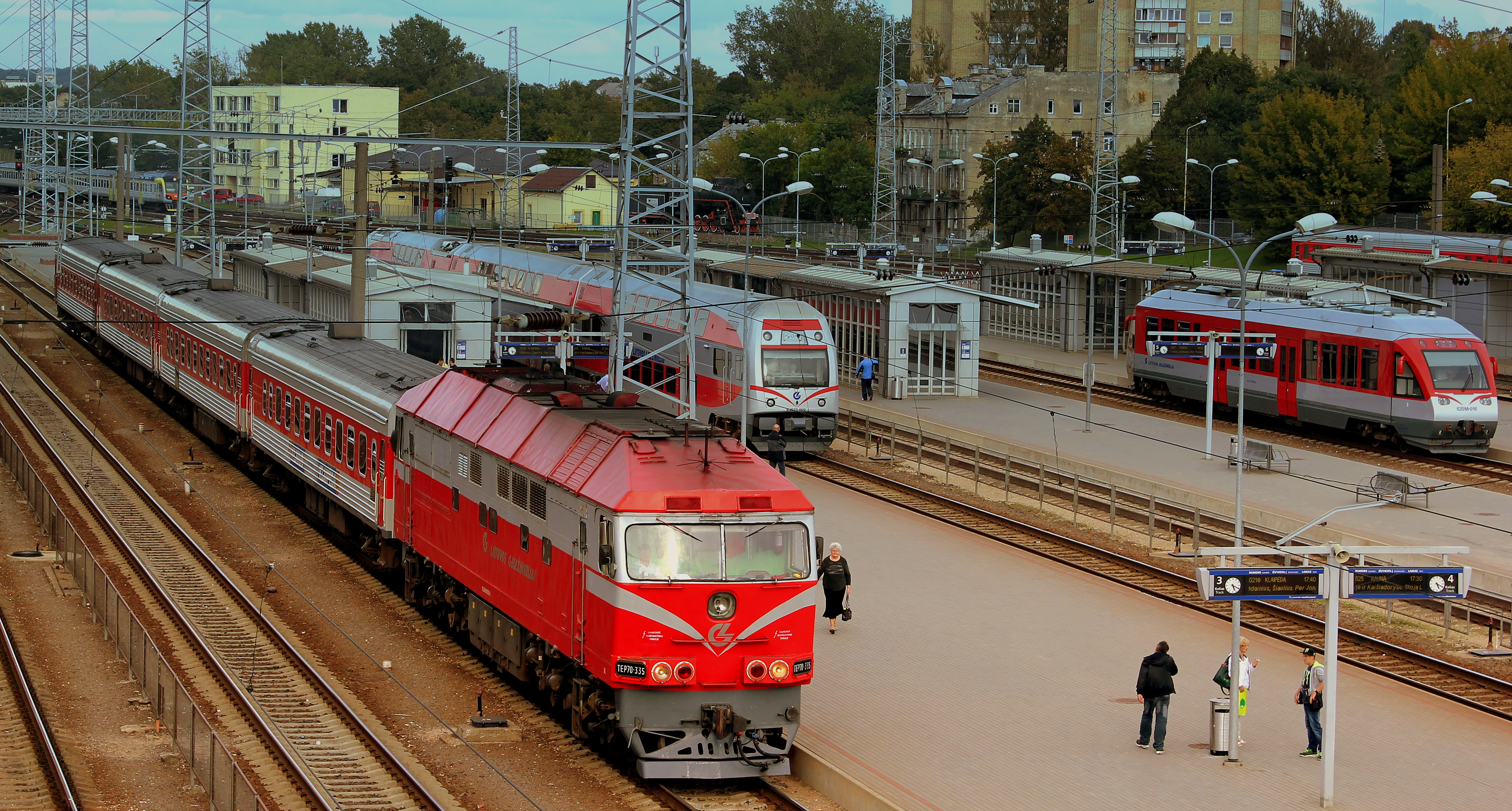 VILLINUS RAILWAY STATION LITHUANIA SEP 2013